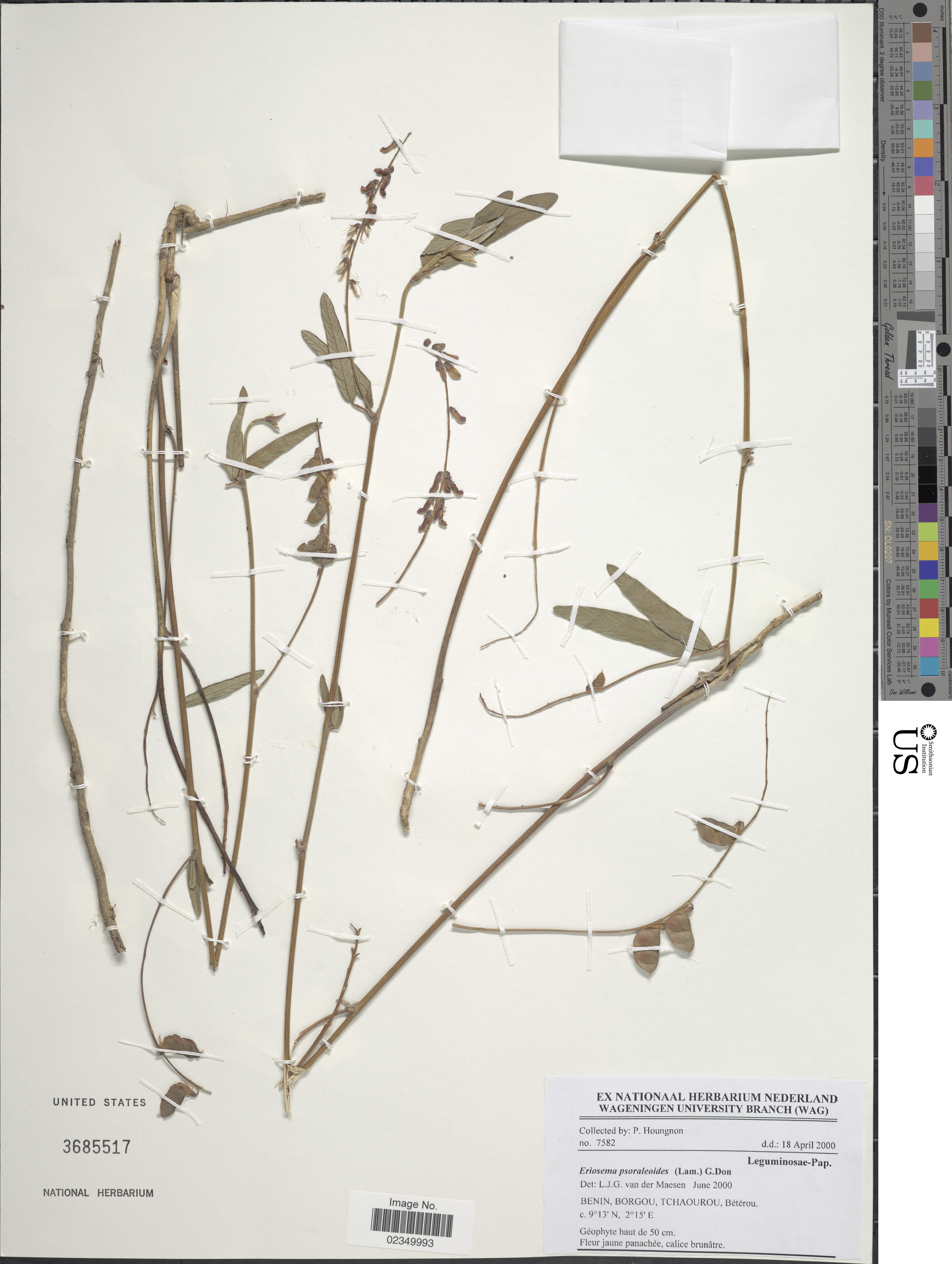 Eriosema psoraloides (Lam.) G. Don Object Details Biogeographical Region 22 - West Tropical Africa Collector P. Houngnon Record Last Modified 19 Dec 2017 Specimen Count 1 Collection Date 18 Apr 2000 Barcode 02349993 USNM Number 3685517 Place Benin, Borgou, Tchaorou, Beterou,, Borgou, Benin, Africa Published Name Eriosema psoraloides (Lam.) G. Don Common name Imbanga zya mwigona Taxonomy Plantae Dicotyledonae Rosales Fabaceae Faboideae NMNH - Botany Dept. Record ID nmnhbotany_13729447 Usage of Metadata (Object Detail Text) CC0 GUID (Link to Original Record)